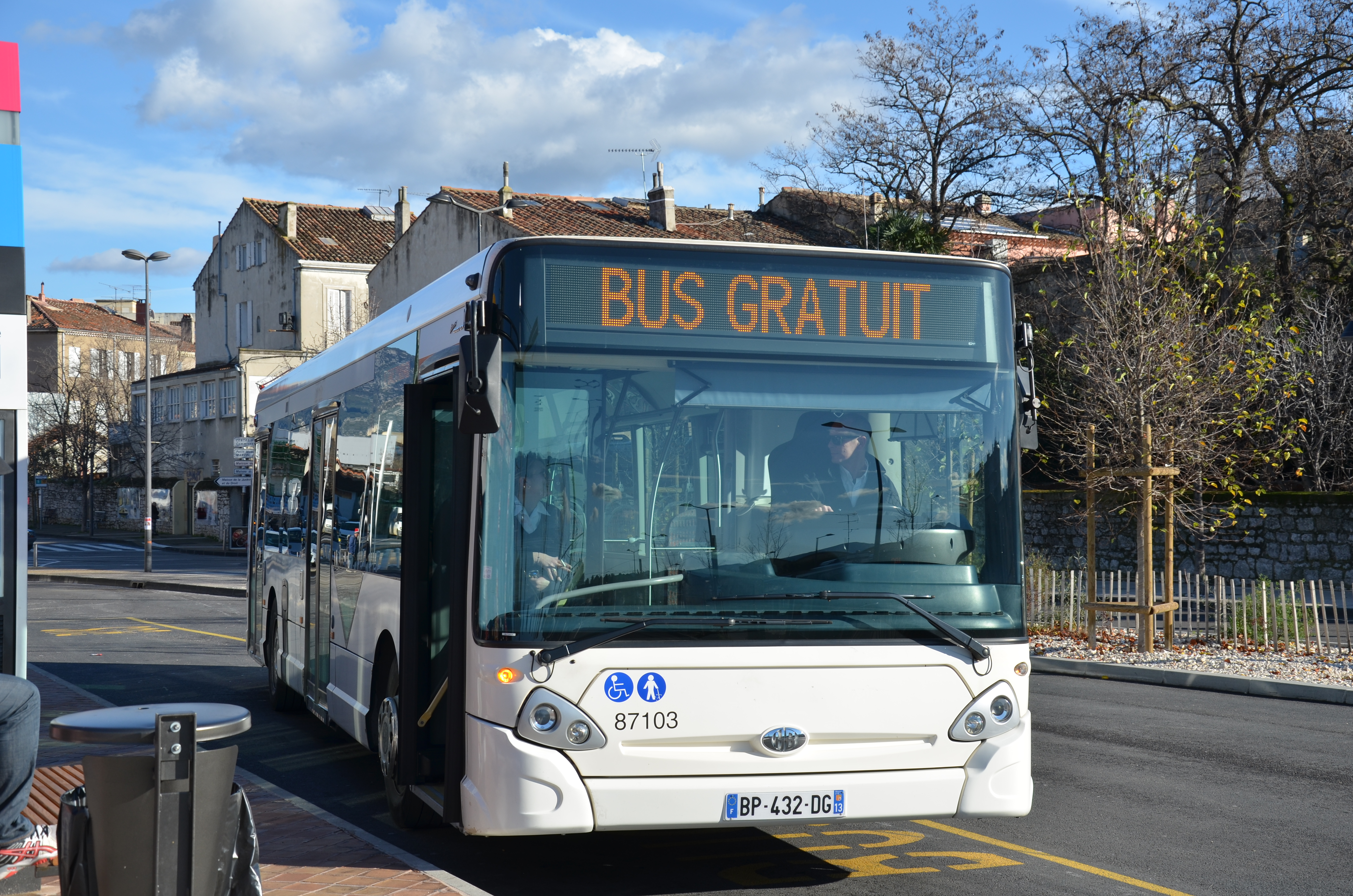 Heuliez GX 327 de la ligne 1, à son terminus Gare d'Aubagne.